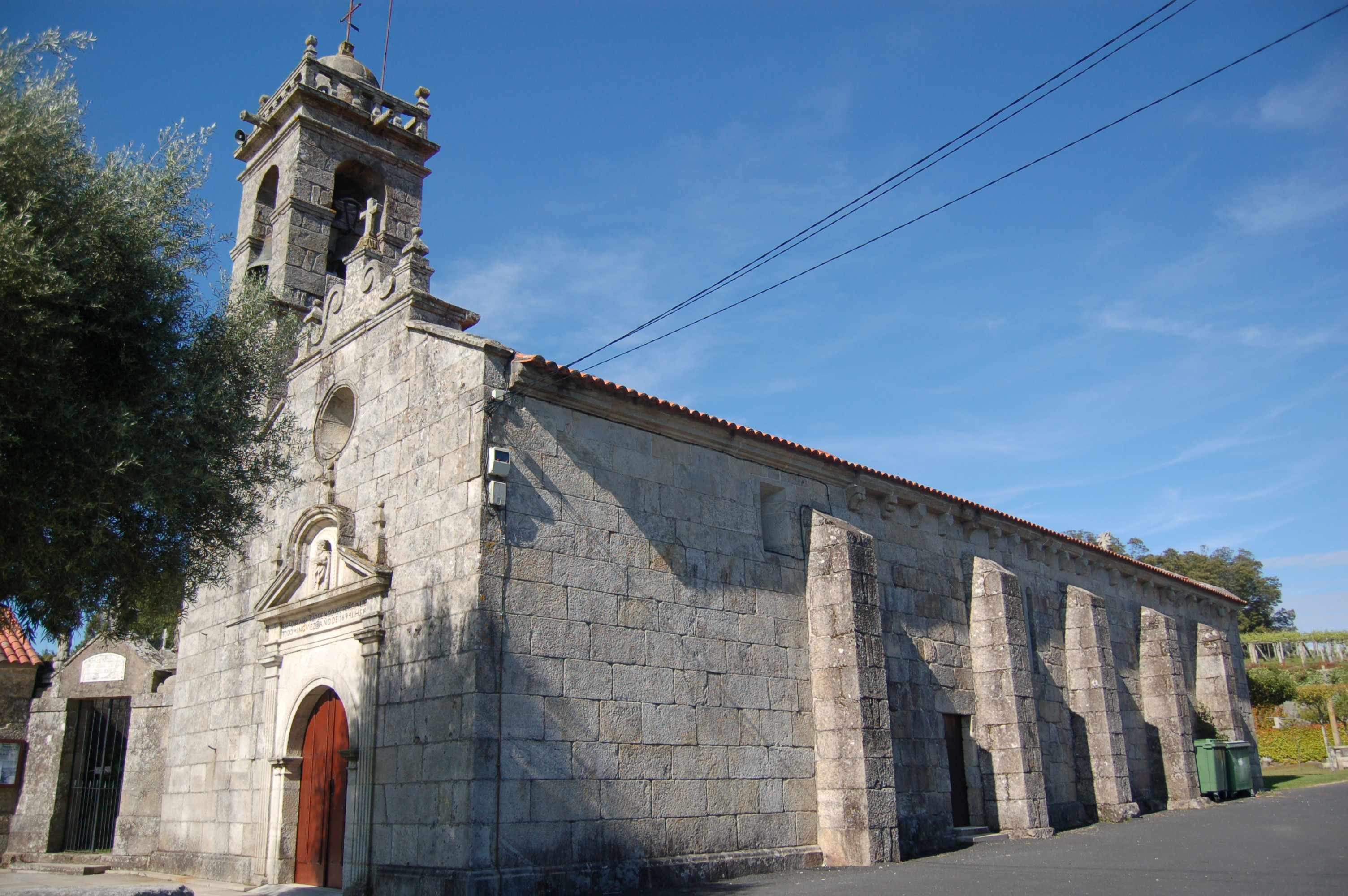 Igrexa parroquial de Santo André de Barrantes (Ribadumia)